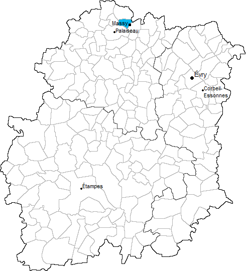 Carte de situation du canton de Massy-Ouest en Essonne (91)